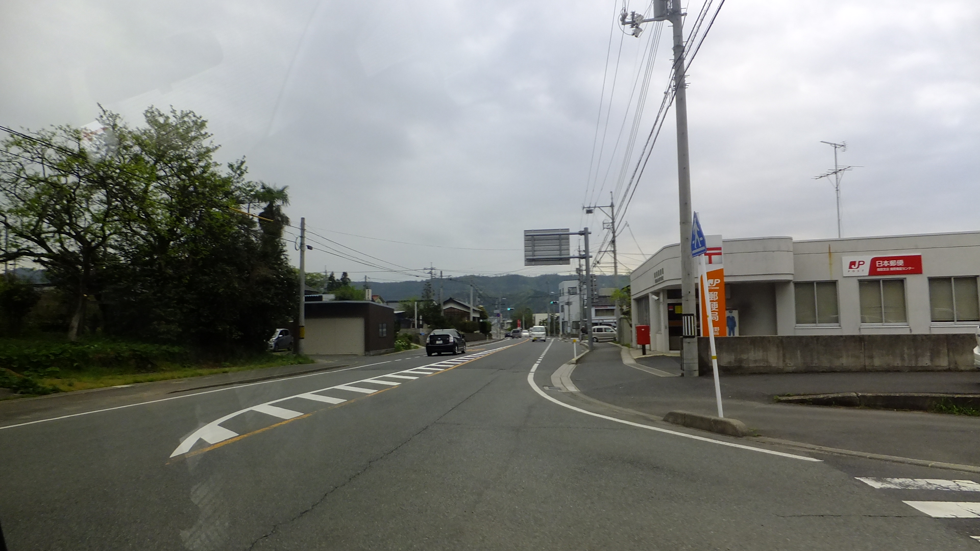 鳥取県鳥取市鹿野町鹿野 鳥取県道21号鳥取鹿野倉吉線